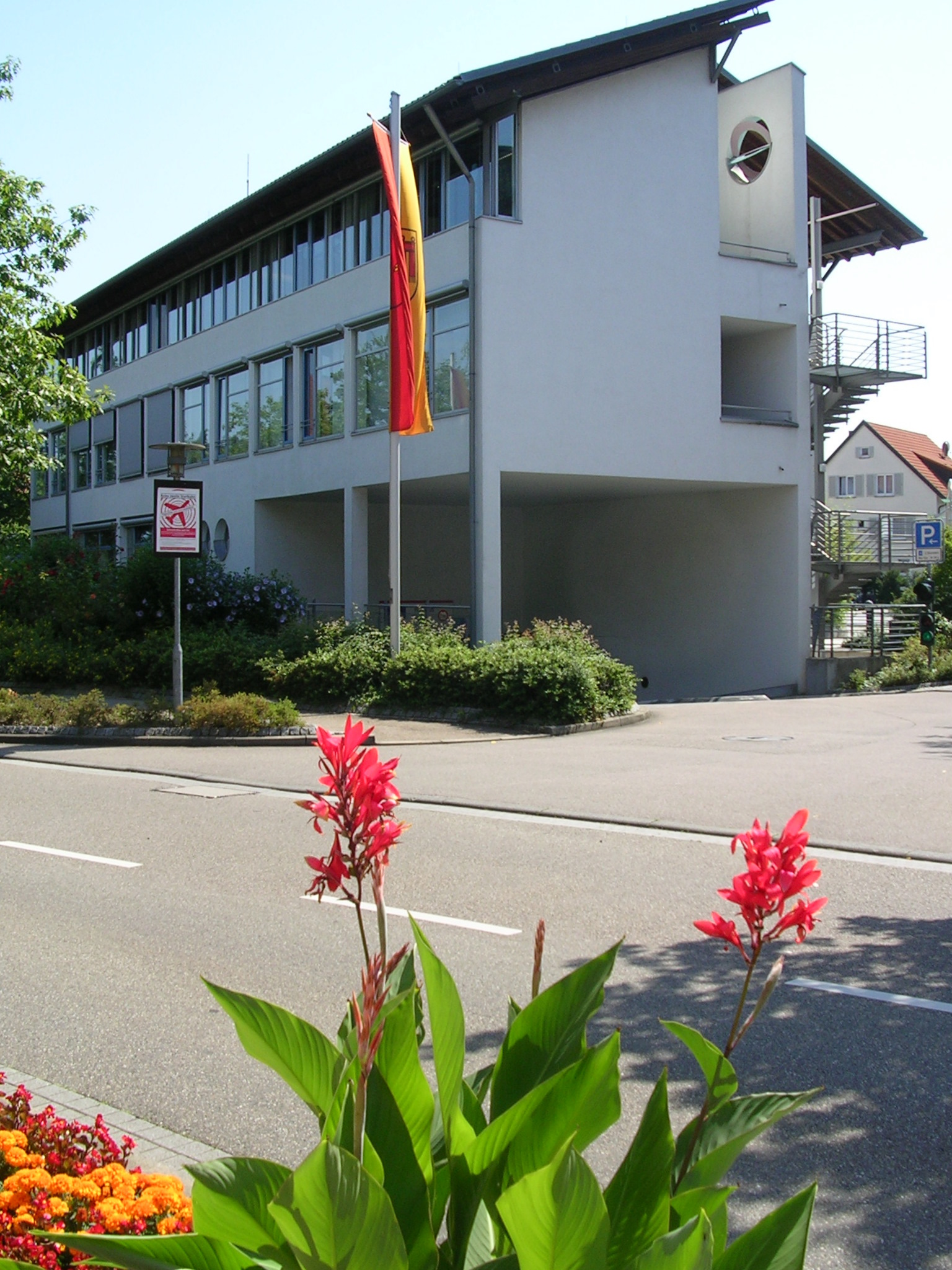 Rathaus in Deizisau (townhall, Deizisau, Germany)